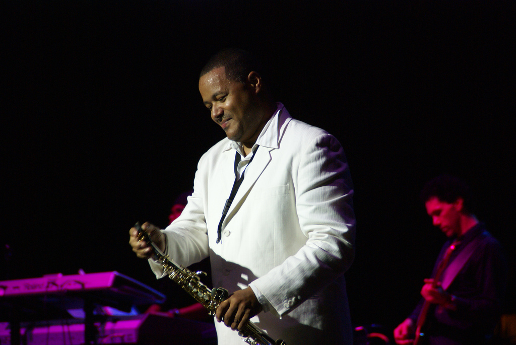 Najee